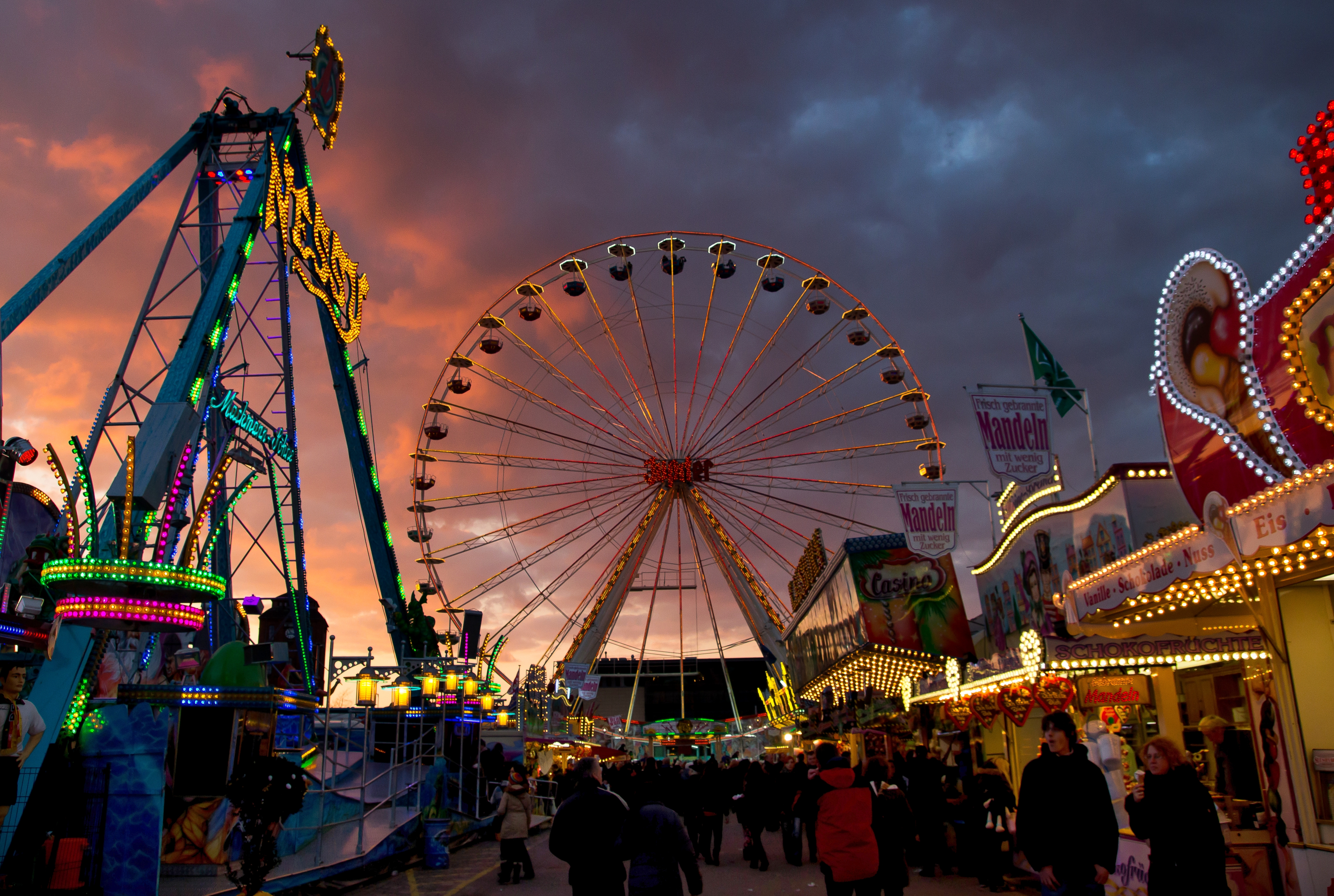 Teilansicht der Bremer Osterwiese 2013 am Abend. Beim Riesenrad im Hintergrund handelt es sich um das 44 Meter hohe Riesenrad-Fahrgeschäft „Jupiter“ (Baujahr 1993) des Bonner Schaustellerbetriebs Barth & Kipp.